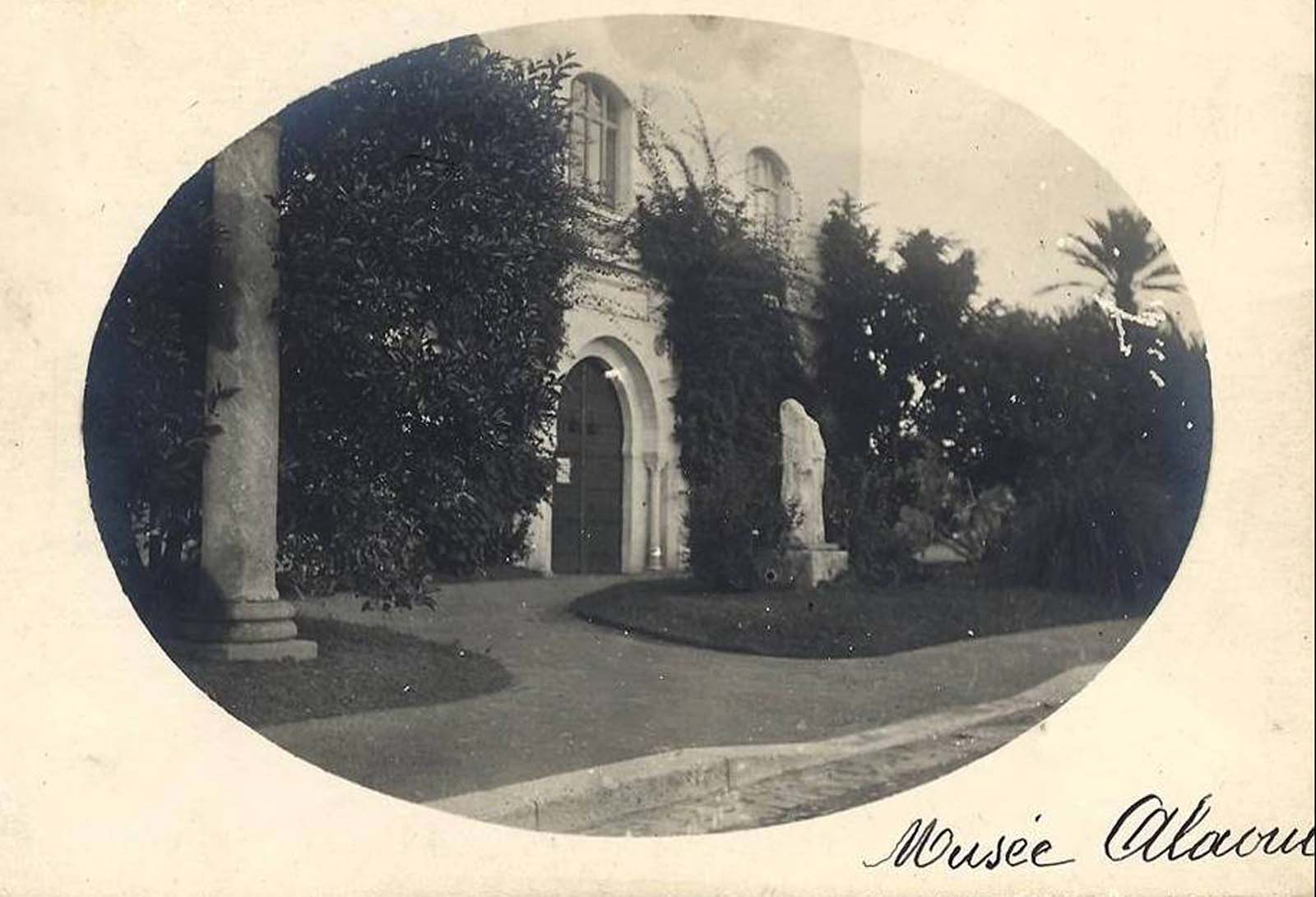 Entrée du musée Alaoui au Bardo (Tunisie)